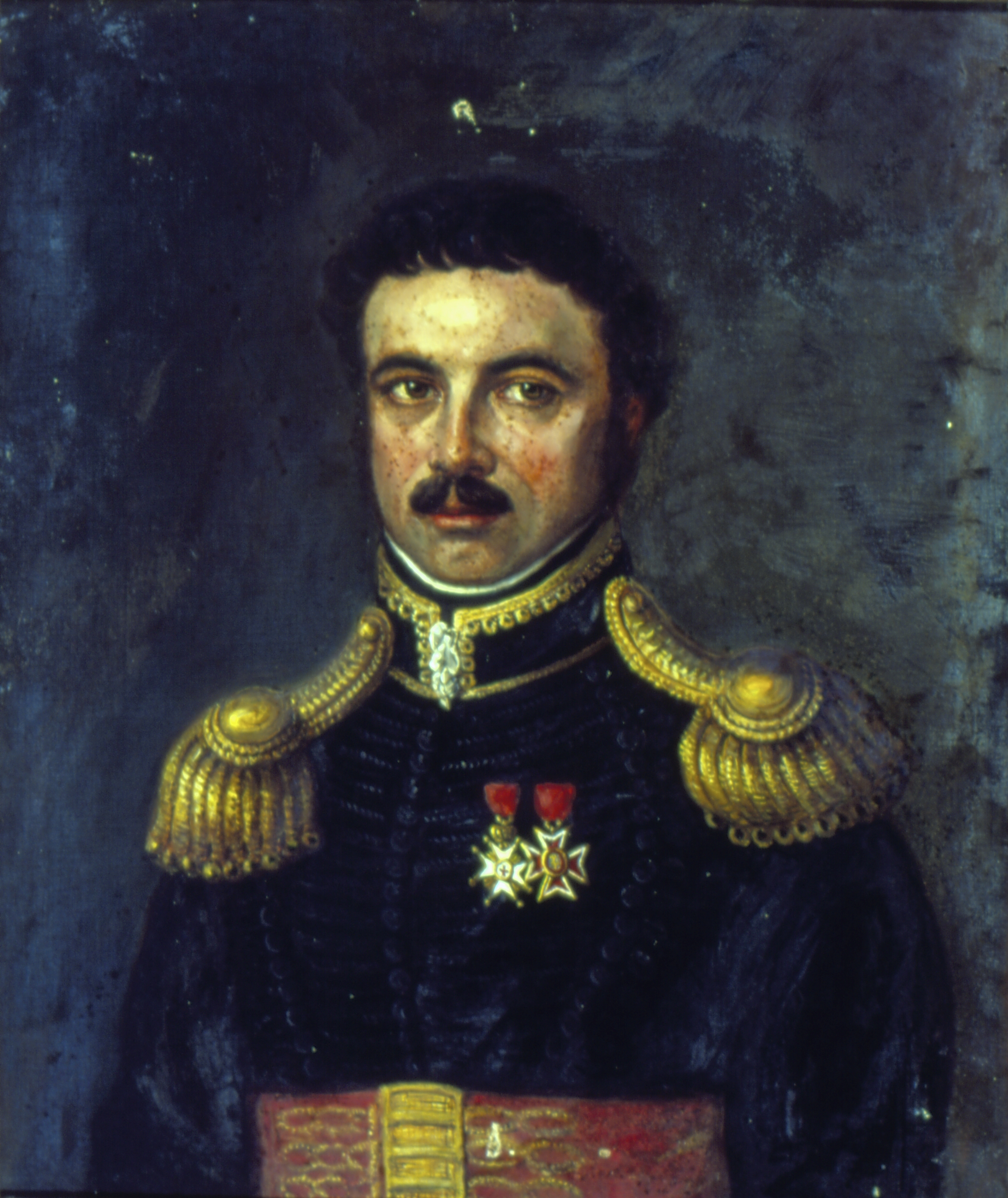 Obra que integra o acervo do Museu Paulista da USP.